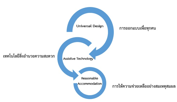 ภาพแสดงการเข้าถึงและใช้ประโยชน์จากสภาพแวดล้อมและสิ่งอำนวยความสะดวก 3 ระดับ